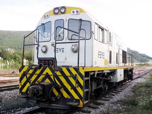 La Tajuña 1511 espera realizar trenes de trabajo en la estacion cántabra de Unquera, lejos de su línea original en Madrid.